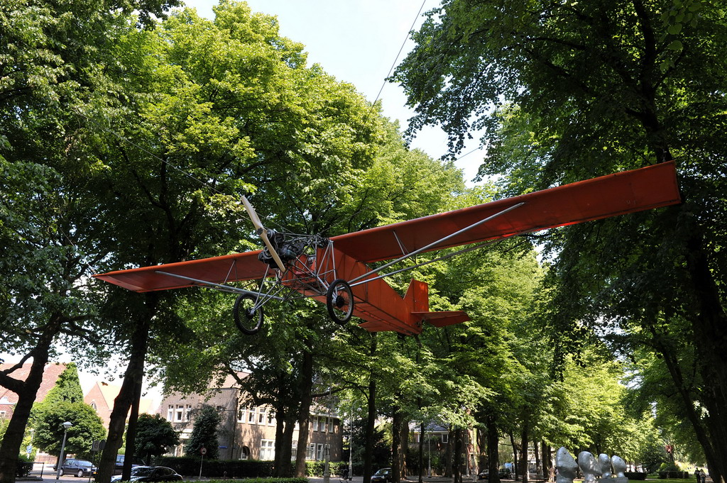 'Airplane' (2000) van Joost Conijn (Nederland 1971). Met dit zelf gebouwde vliegtuig vloog Conijn naar Marokko om er daar de woestijn mee te gaan verkennen.